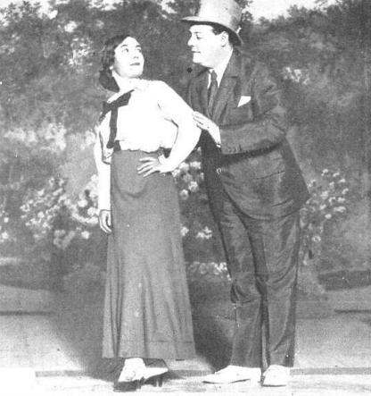 Los actores Casimiro Ortas y Consuelo Mayendía en una escena de la obra de teatro Diana la cazadora, de los Hermanos Álvarez Quintero